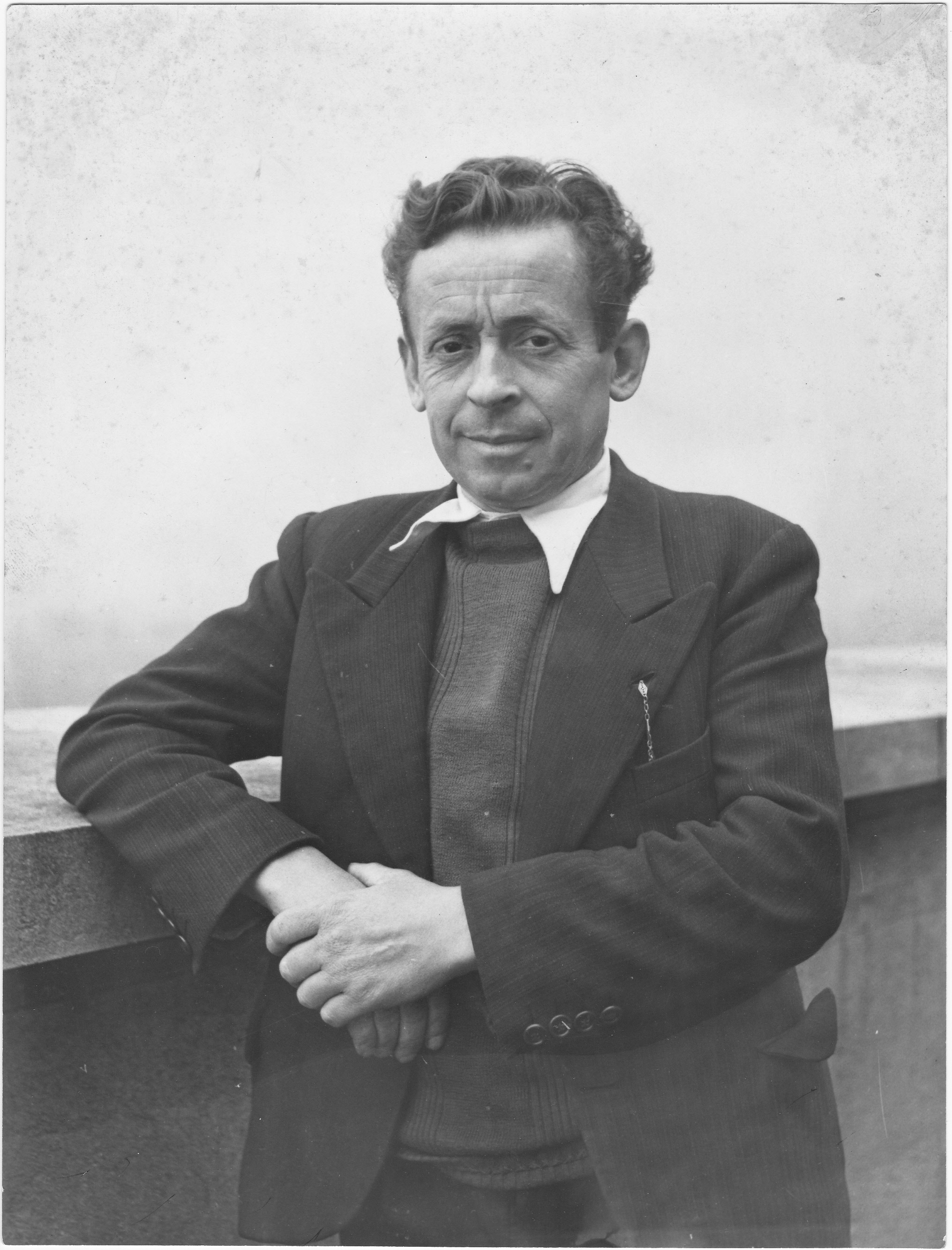 Portrait de Gabriel Robin (photo issue de la collection familiale)